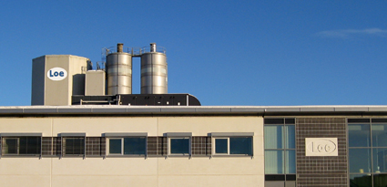 Bilde av den nye fabrikken til Loe Rørprodukter